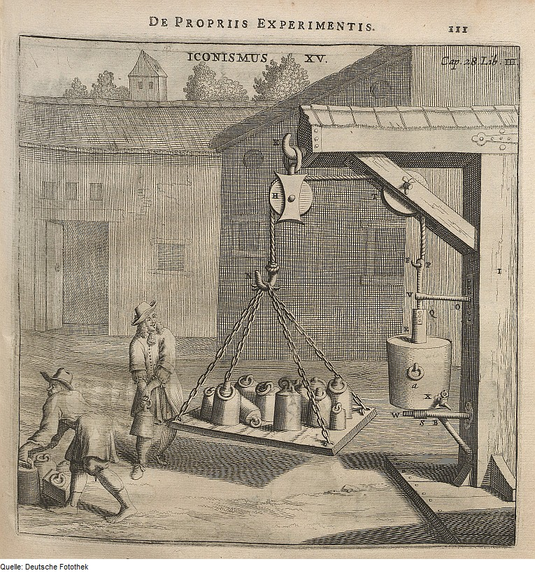 Original image description from the Deutsche Fotothek Physik & Vakuumtechnik & Luftdruck & Seilzug & Gravitation